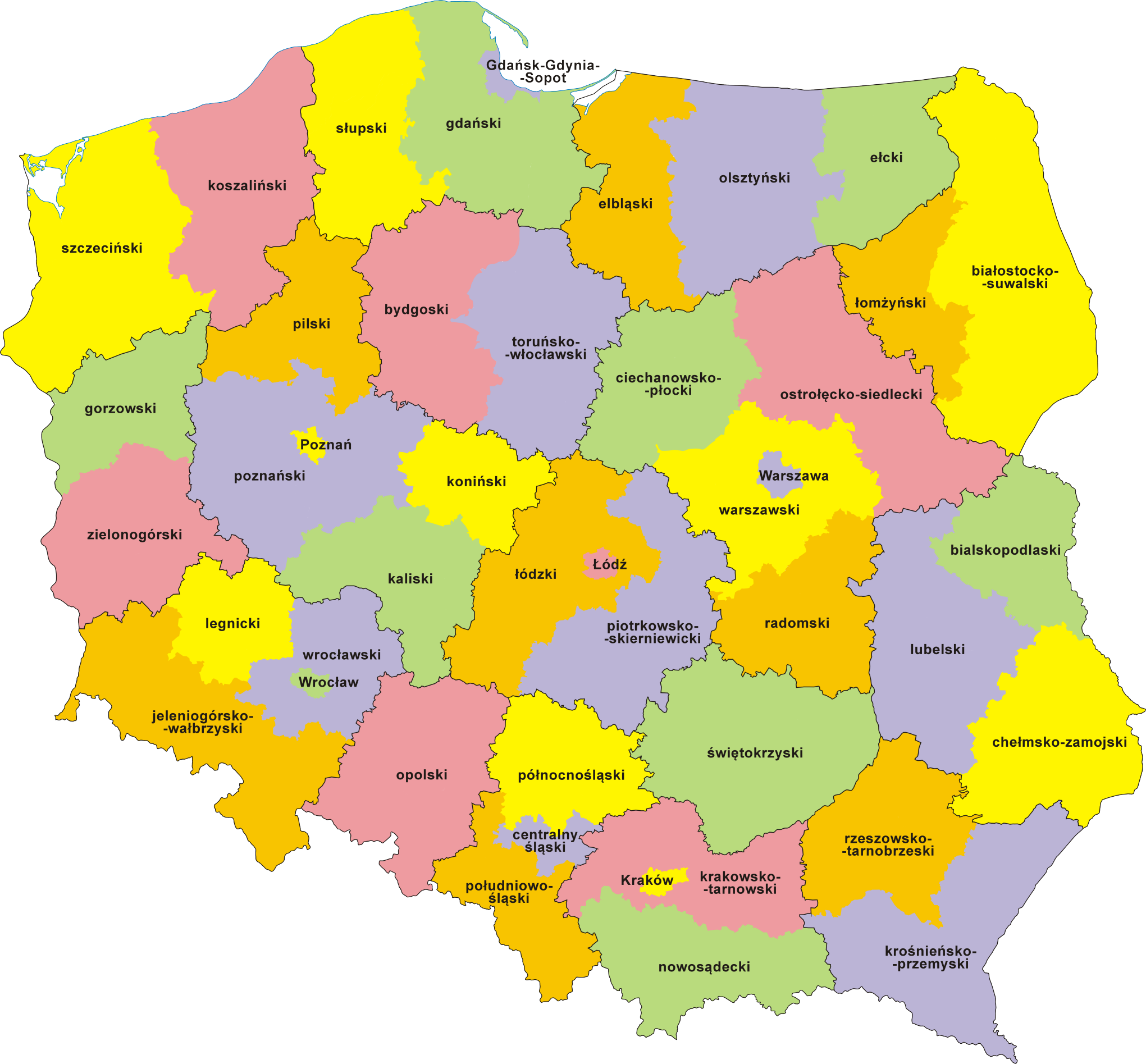 Polska – jednostki NTS 3 wg podziału obowiązującego od 8 sierpnia 2000 roku do 18 kwietnia 2002 roku